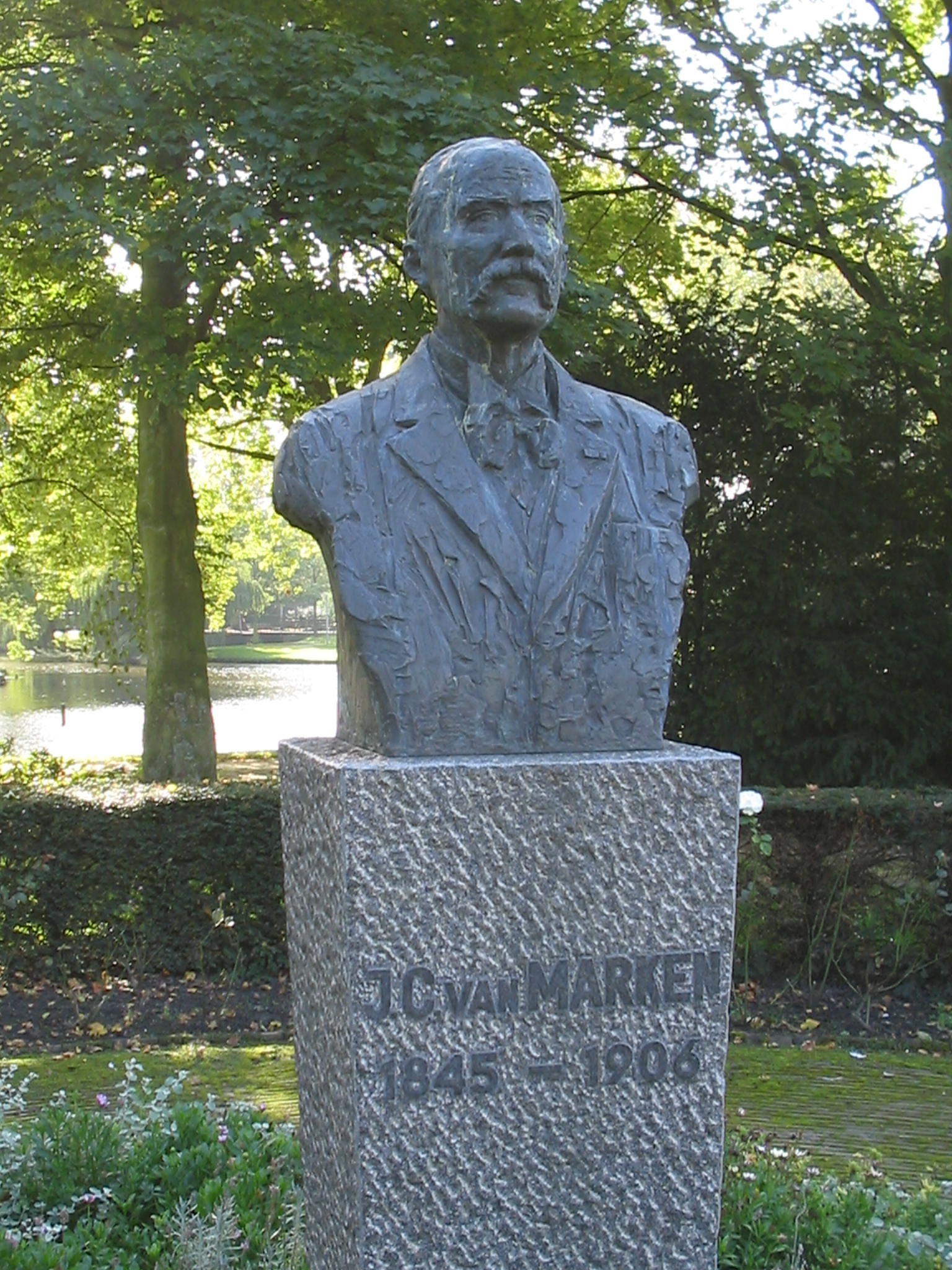 Agnetapark, Delft, 18 oktober 2005